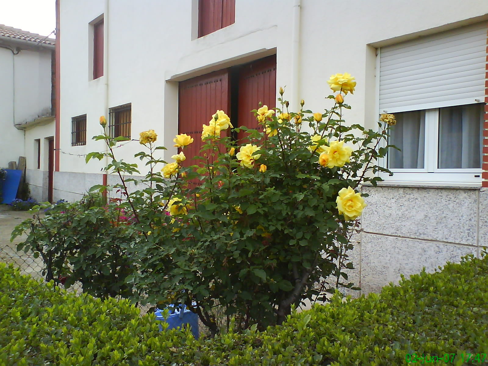 Flores de las casas de Santiago del Molinillo, en el municipio de Las Omañas (León, España)